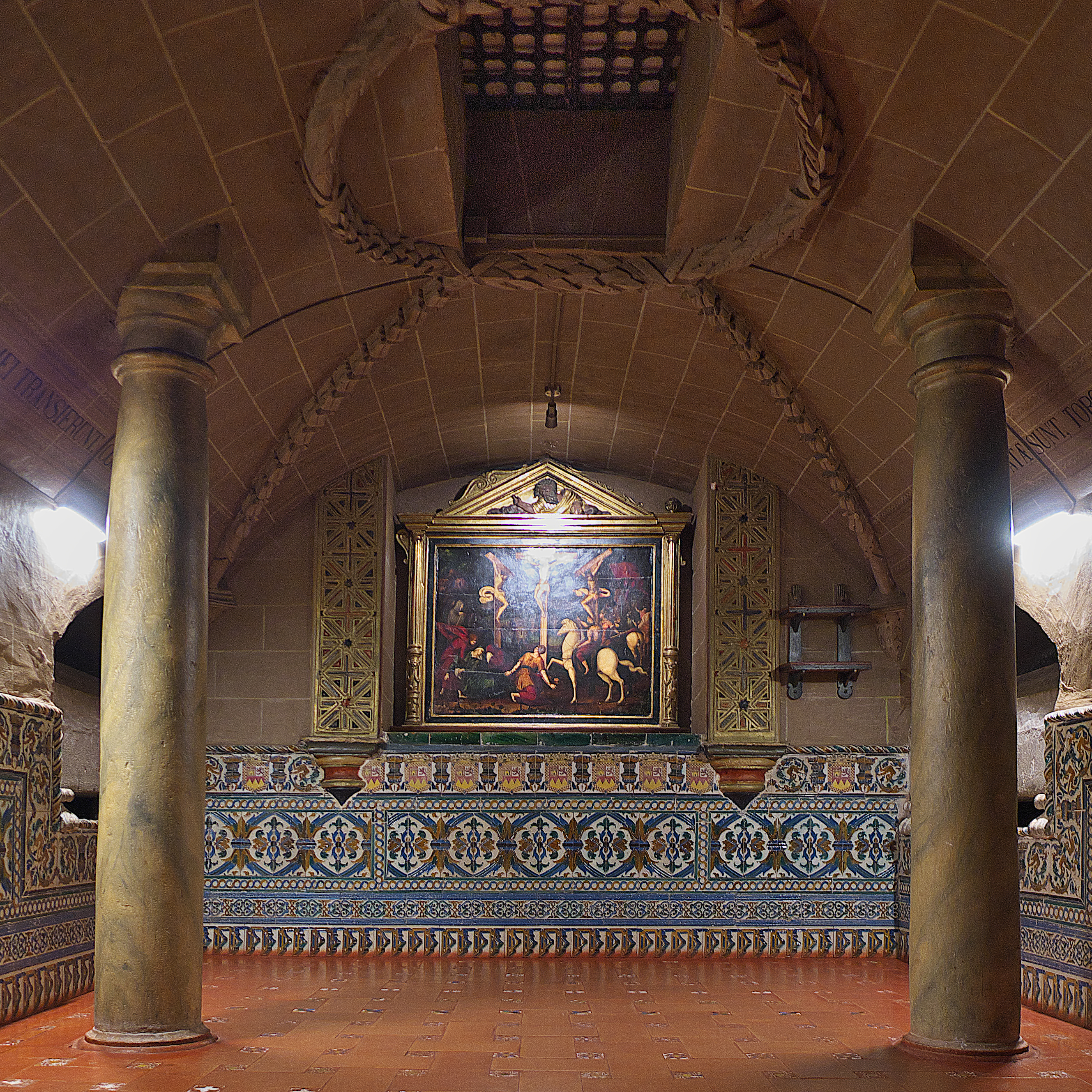 Capilla de Profundis, después de la restauración de Jacobo Galí y Gasseta. La tabla de la Crucifixión, de mediados del s. XVI, es copia de un grabado de Antonio de Salamanca. En esta capilla estan enterrados, Juan Téllez Girón, su esposa, Leonor de la Vega Velasco, y Enrique de Guzmán.